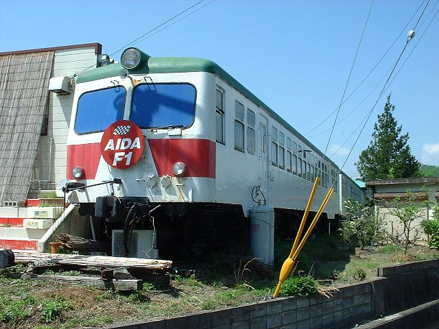 旧ja:岡山臨港鉄道 キハ7001（元ja:夕張鉄道キハ252） 岡山県美作市（撮影当時は英田郡ja:英田町）